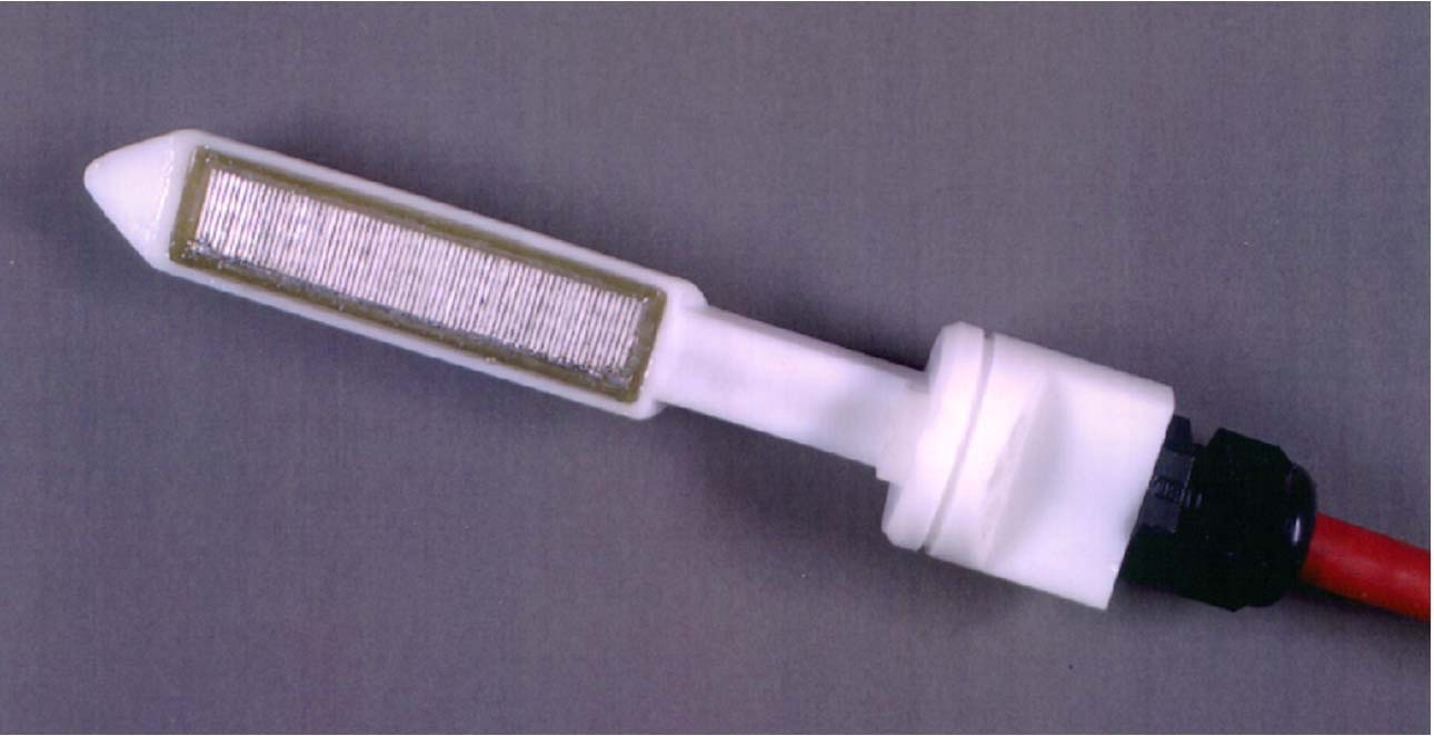 Линейная решетка для хирургического лечения простаты [1][2]